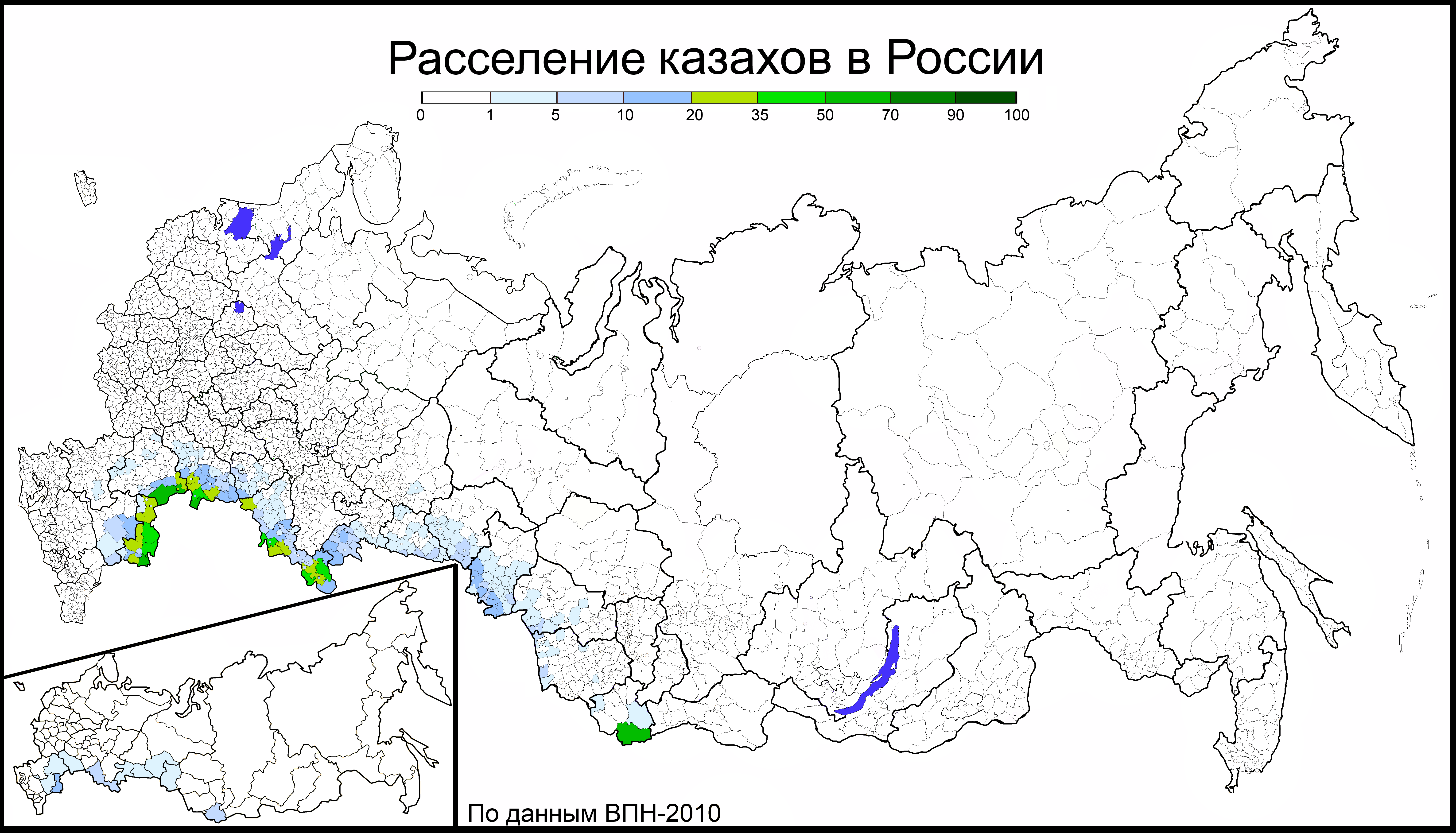 Расселение казахов в России па районам и городам. По переписи 2010 года